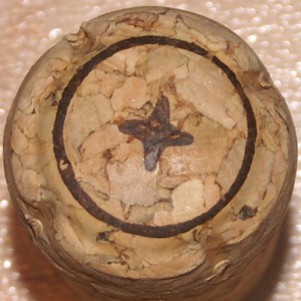 L'estrella a quatre punts d'un tap de Cava